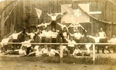 חברי אגודת הנוער בר-כוכבא מסרייבו באימון ספורט